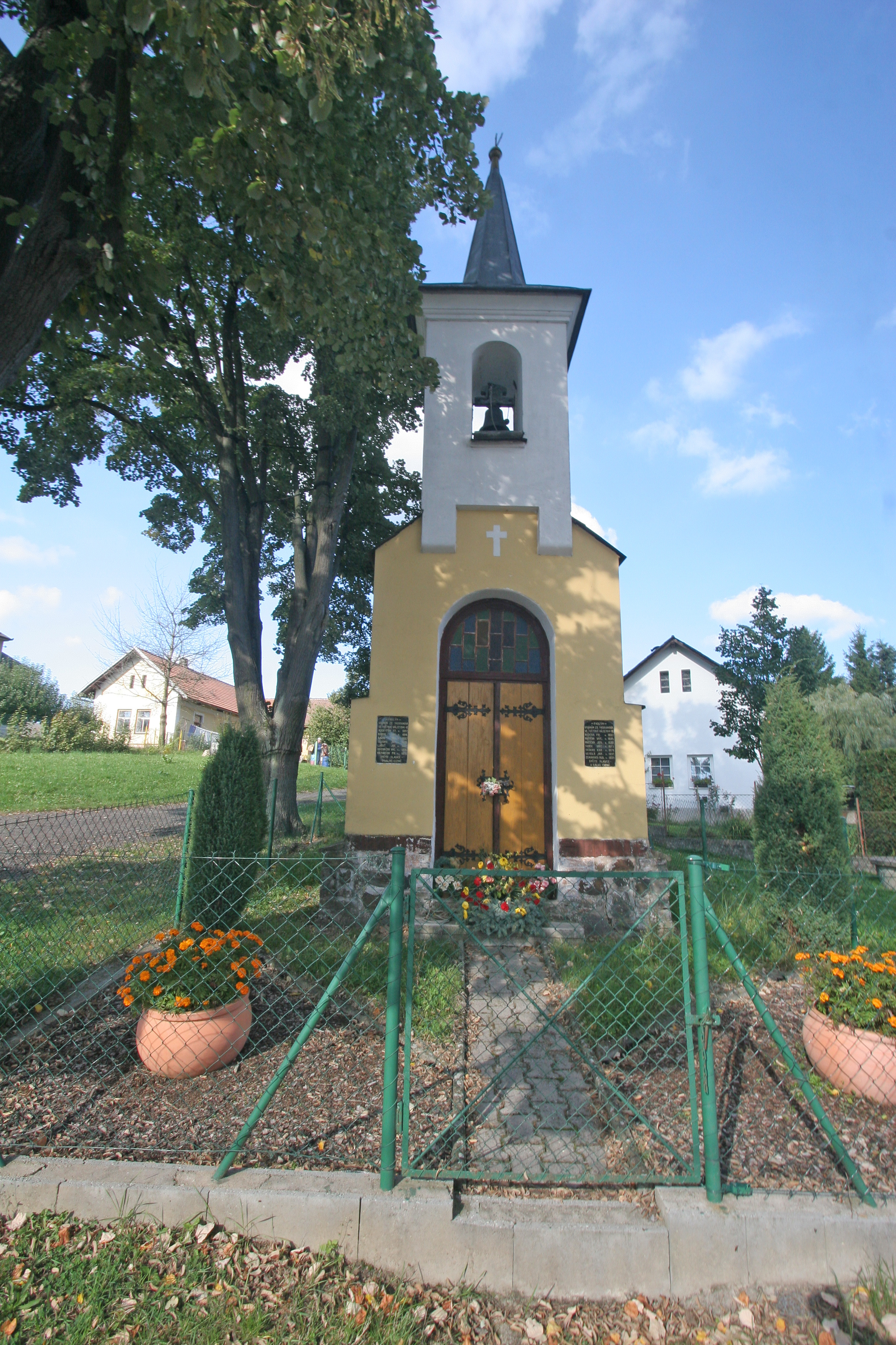 Skoranov kaplička